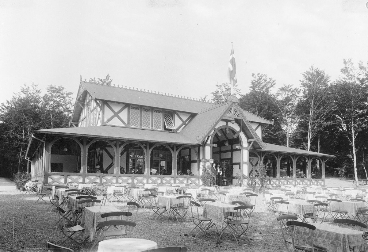 Restaurationen ved Ørnereden